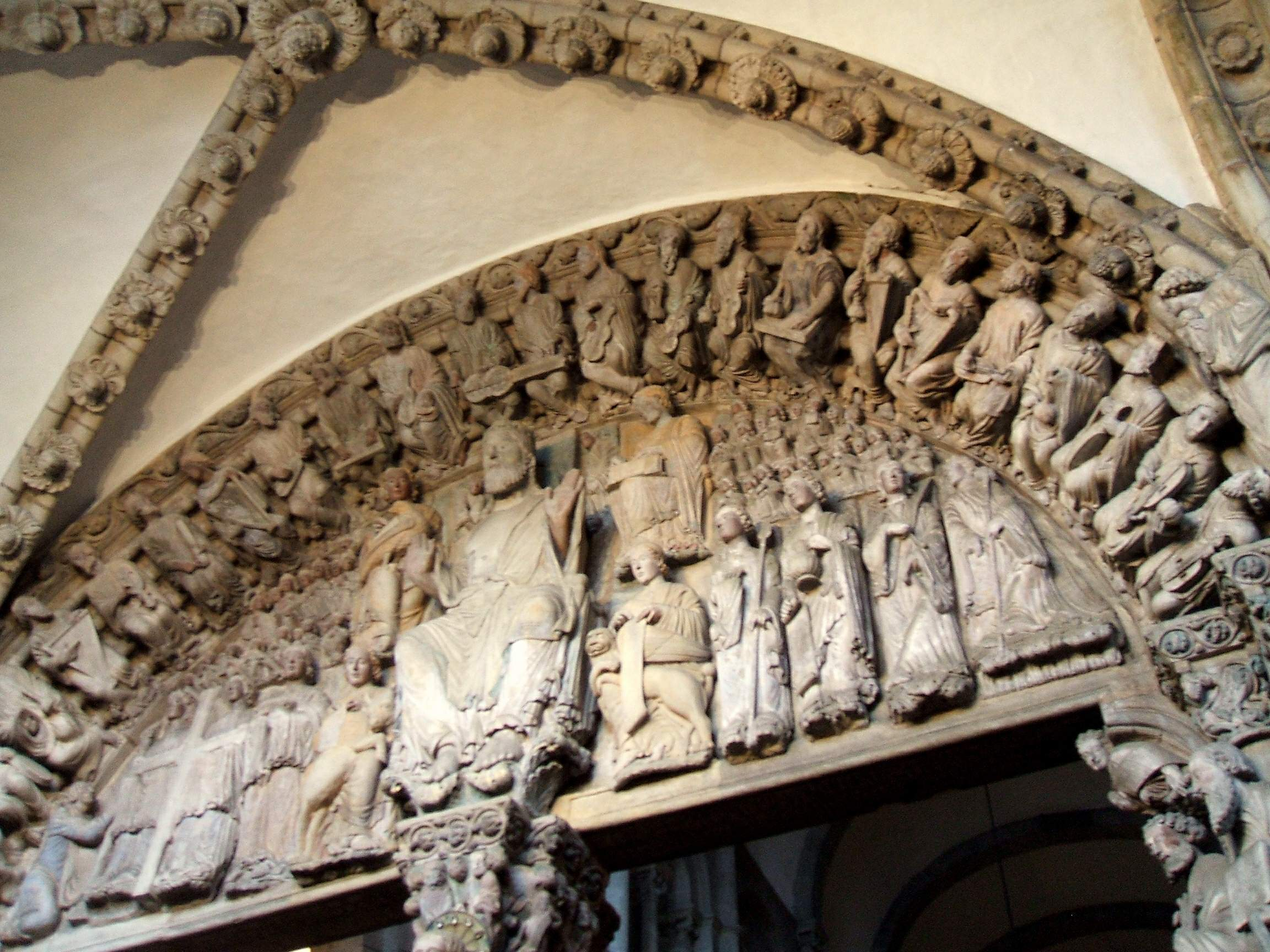 Pórtico de la Gloria, Catedral de Santiago de Compostela